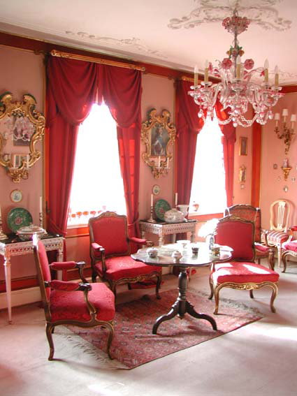 Interiør i en stue i Ernst's Samlinger.